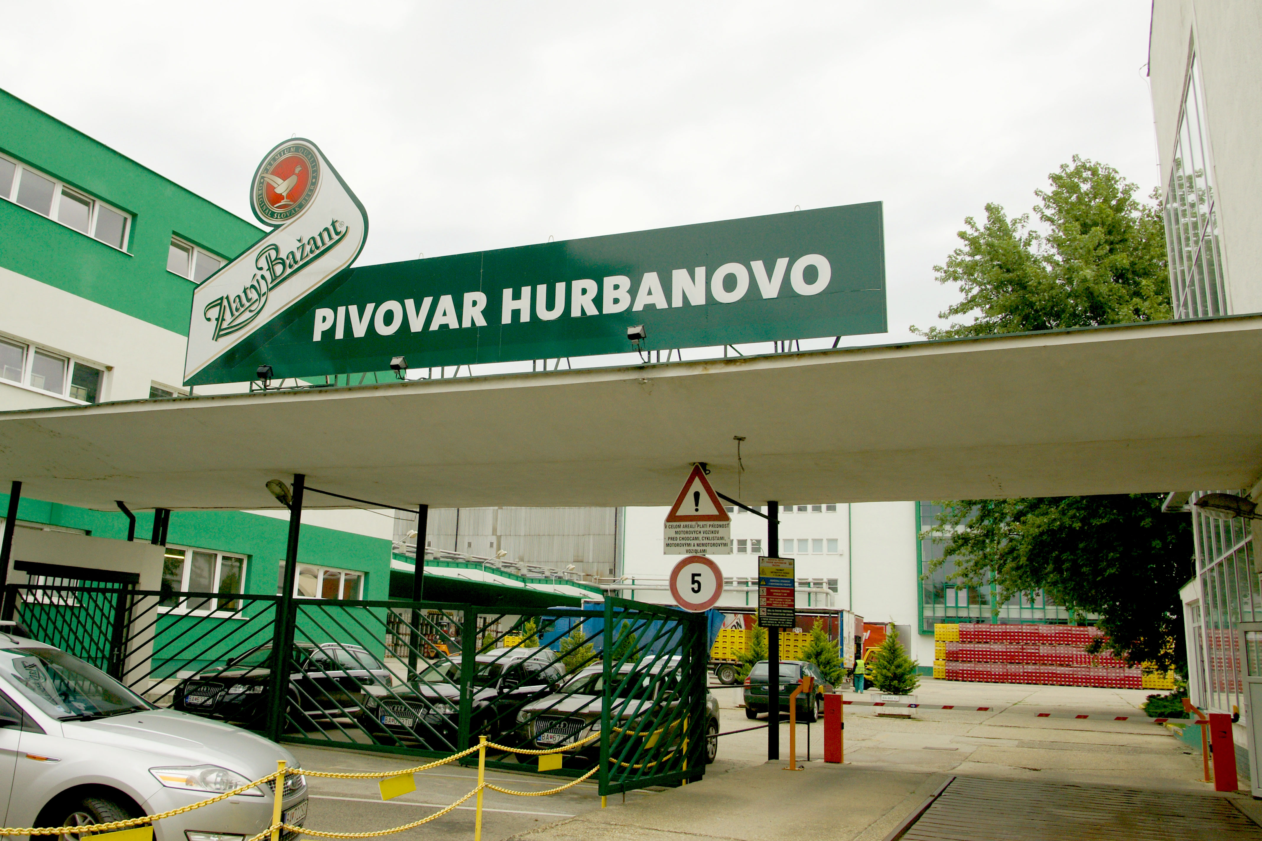 Pivovar Hurbanovu